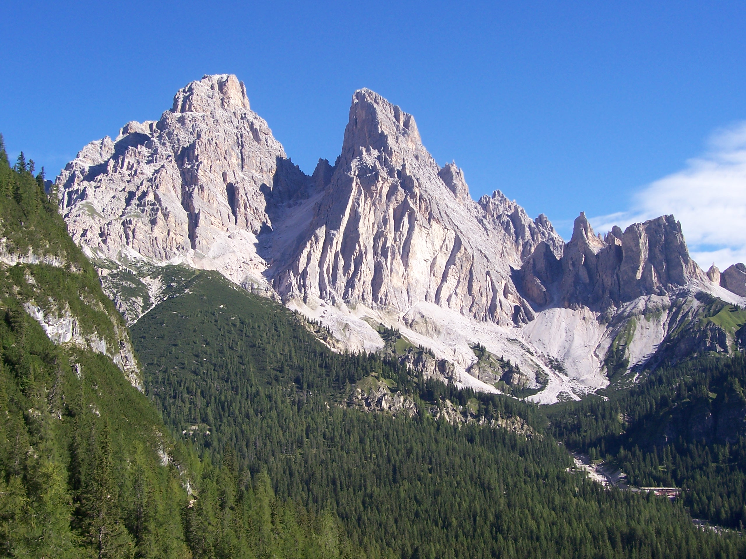 Monte Cristallo, Provincia di Belluno, Italia